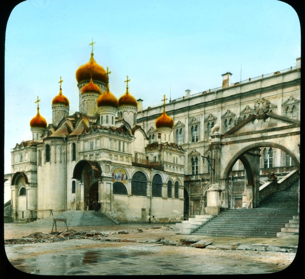 Благовещенский собор Кремля и Красное крыльцо